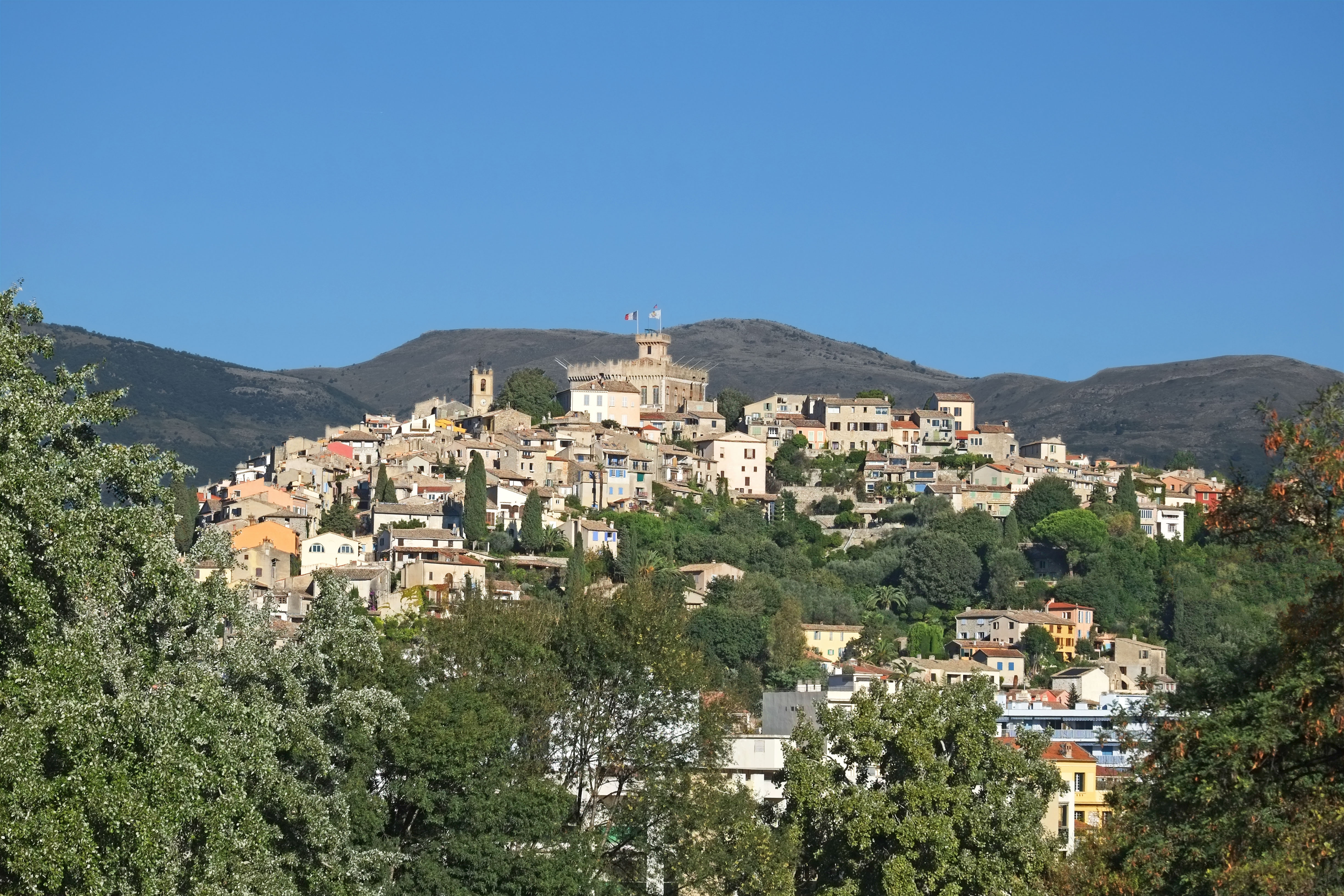 Vue du Haut de Cagnes depuis l’hippodrome au début de l’automne.